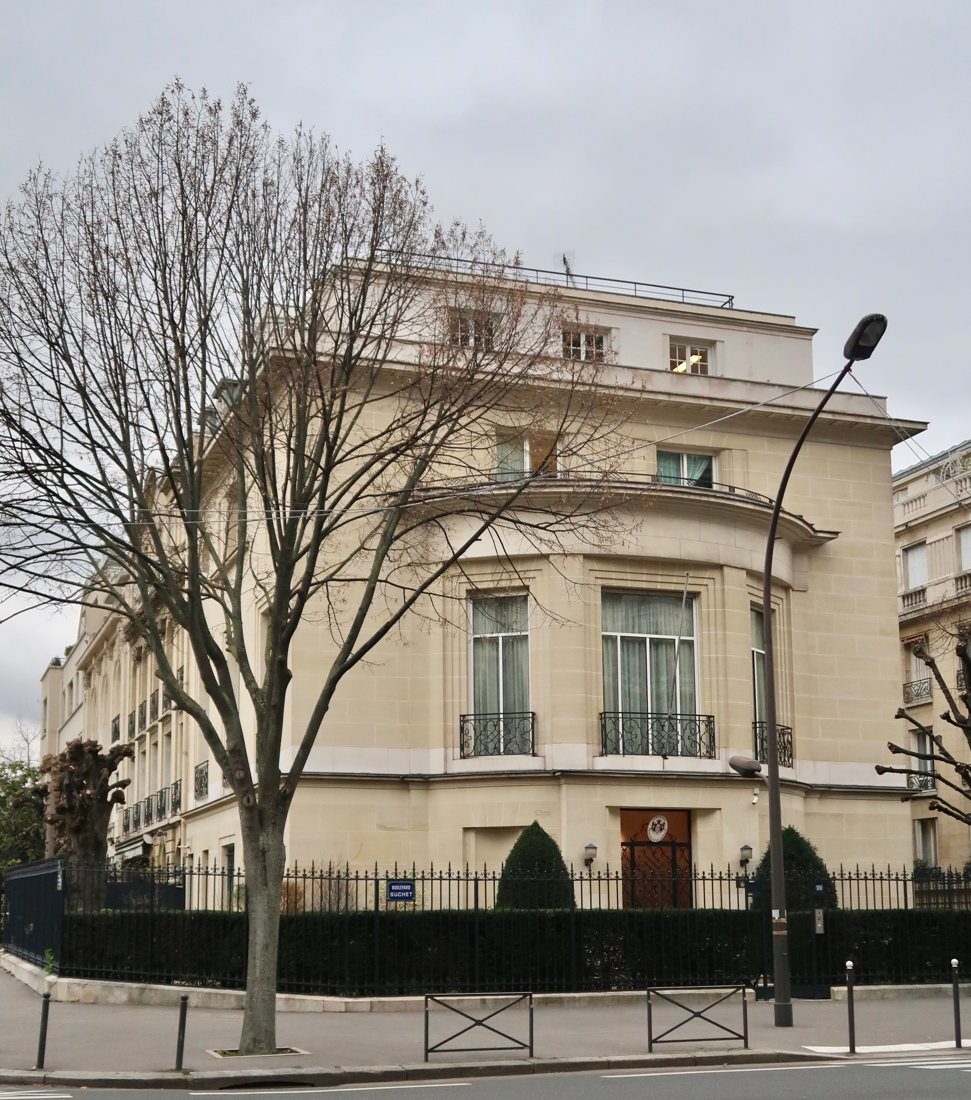 Ambassade de Monaco en France, 22 boulevard Suchet (Paris, 16e).